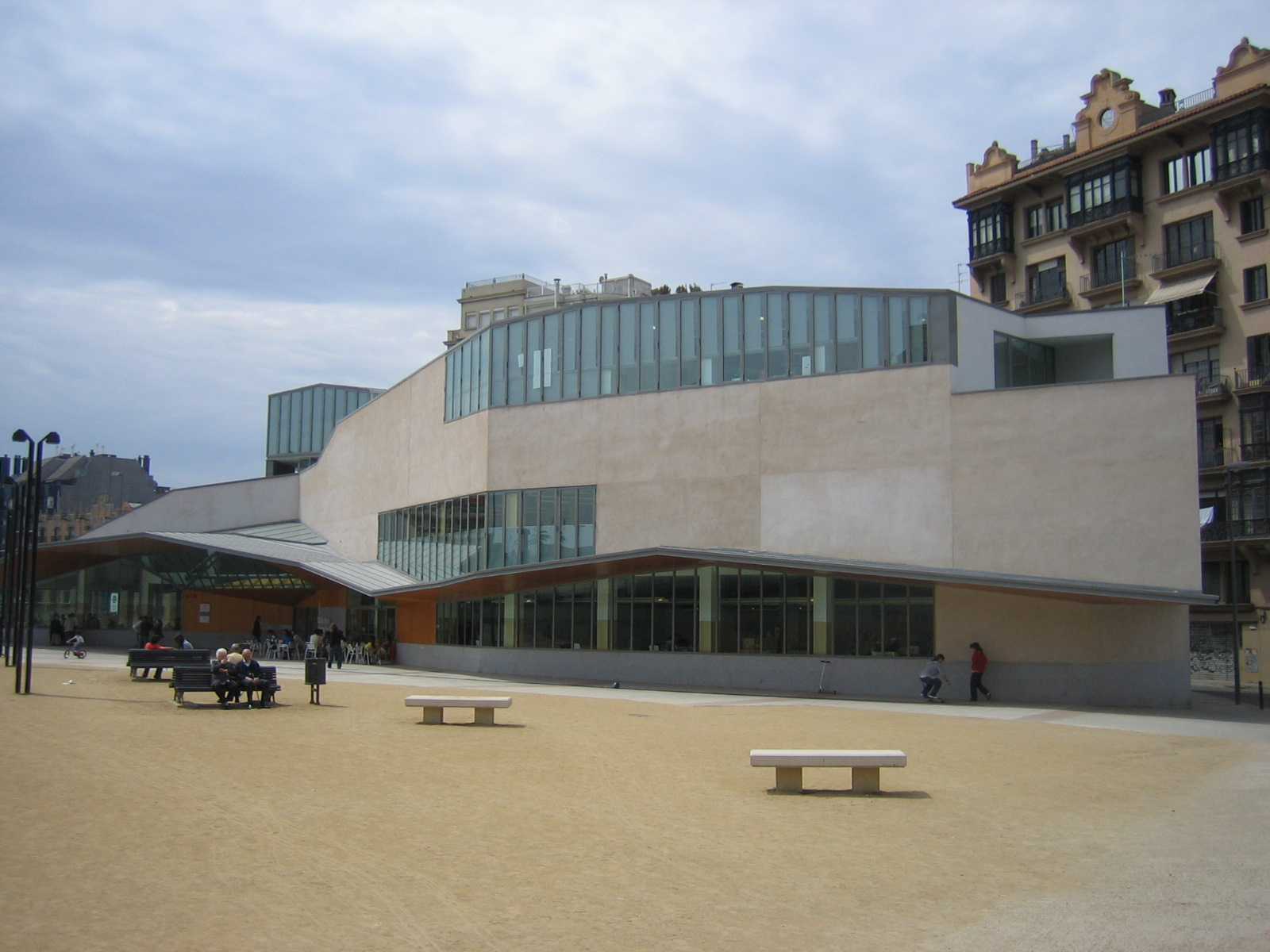 Biblioteca Jaume Fuster, Vila de Gràcia, Barcelona, Catalunya (Premi FAD 2006).Biblioteca